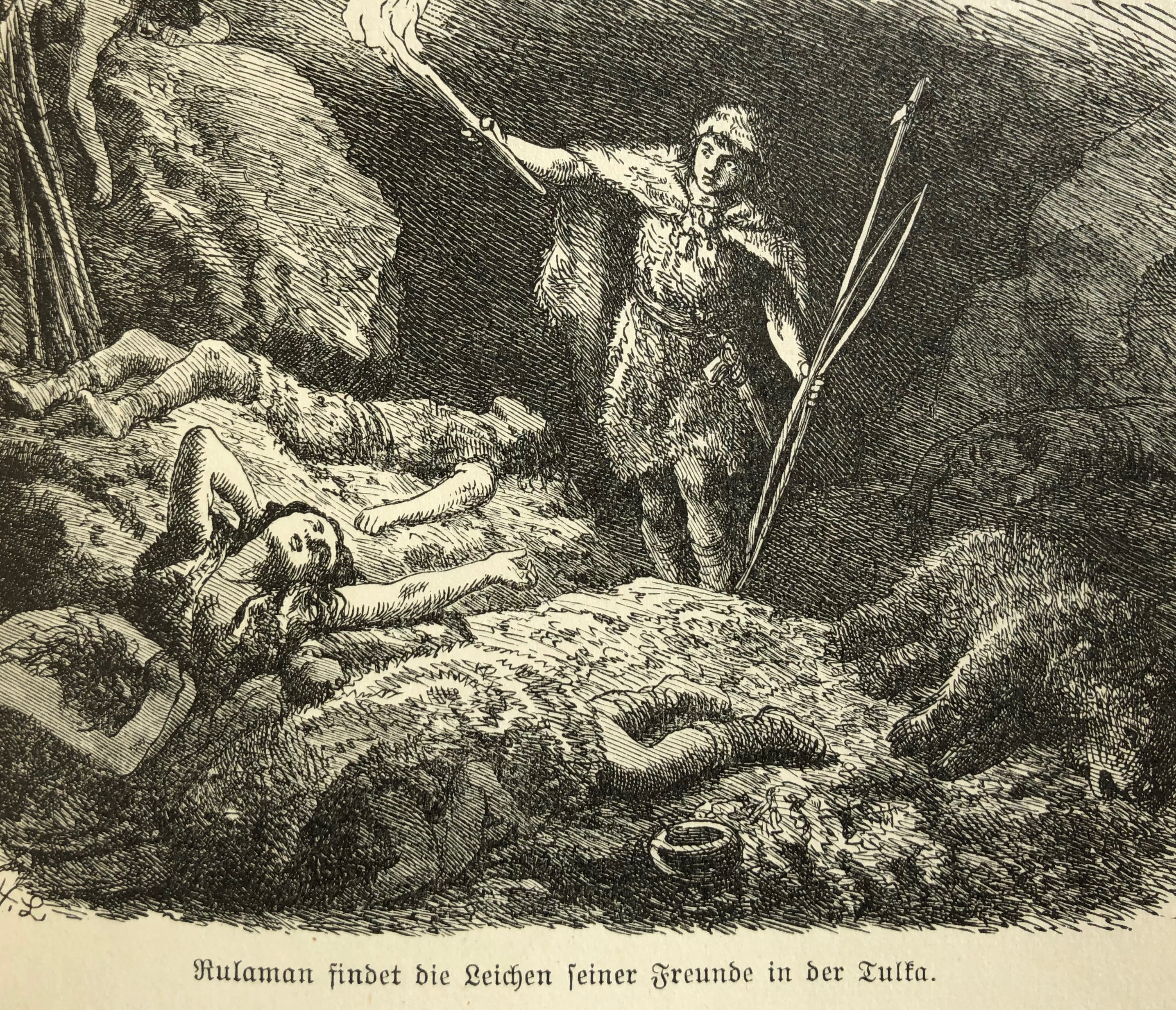 Illustrationen von Heinrich Leutemann aus dem Buch "Rulaman" von David Friedrich Weinland.